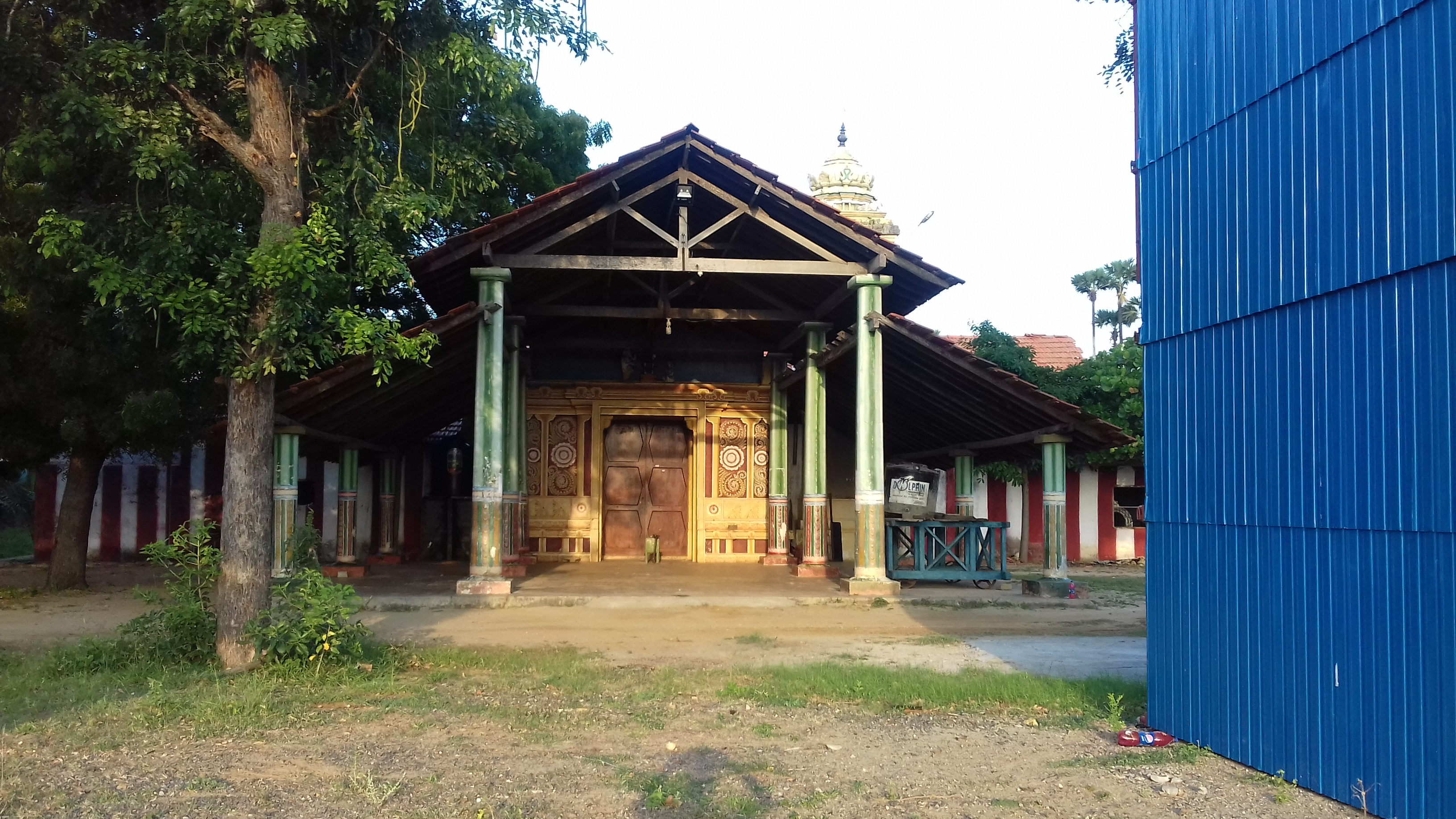 மாகாணம் - வட மாகாணம் மாவட்டம் - யாழ்ப்பாணம்